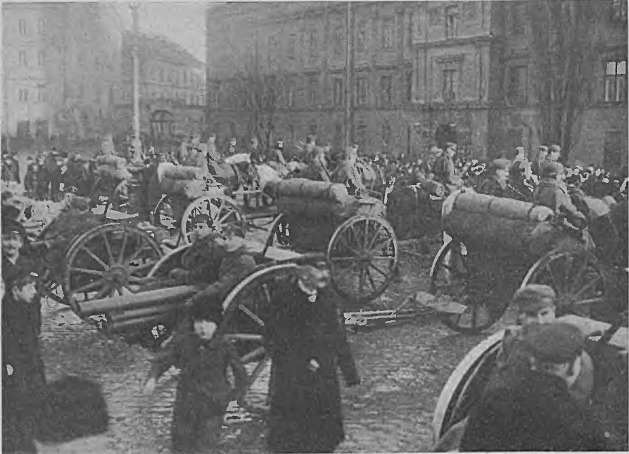 Legioniści na Placu Zamkiwym w Warszawie.